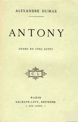 photo de la couverture du livre dans l'édition de 1902